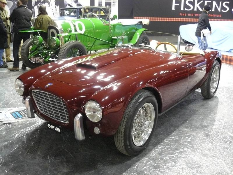 Retromobile 2012